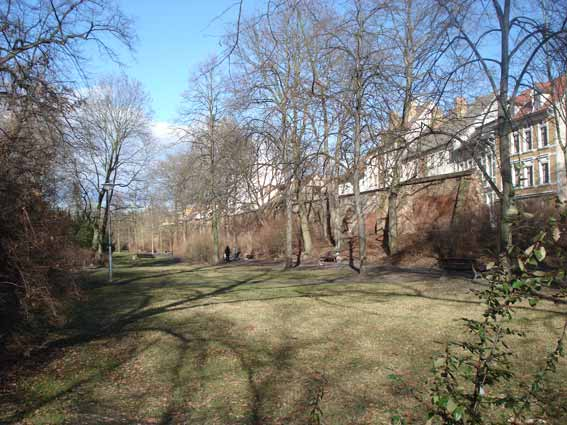 Die Stadtmauer der Neustadt Brandenburg an der Havel im Verlauf des ehemaligen Schleifergrabens